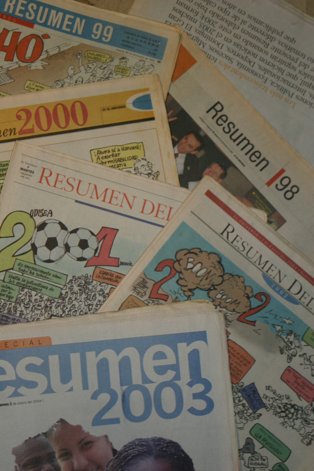 Resumenes de Fin de Año del Diario El UNIVERSO